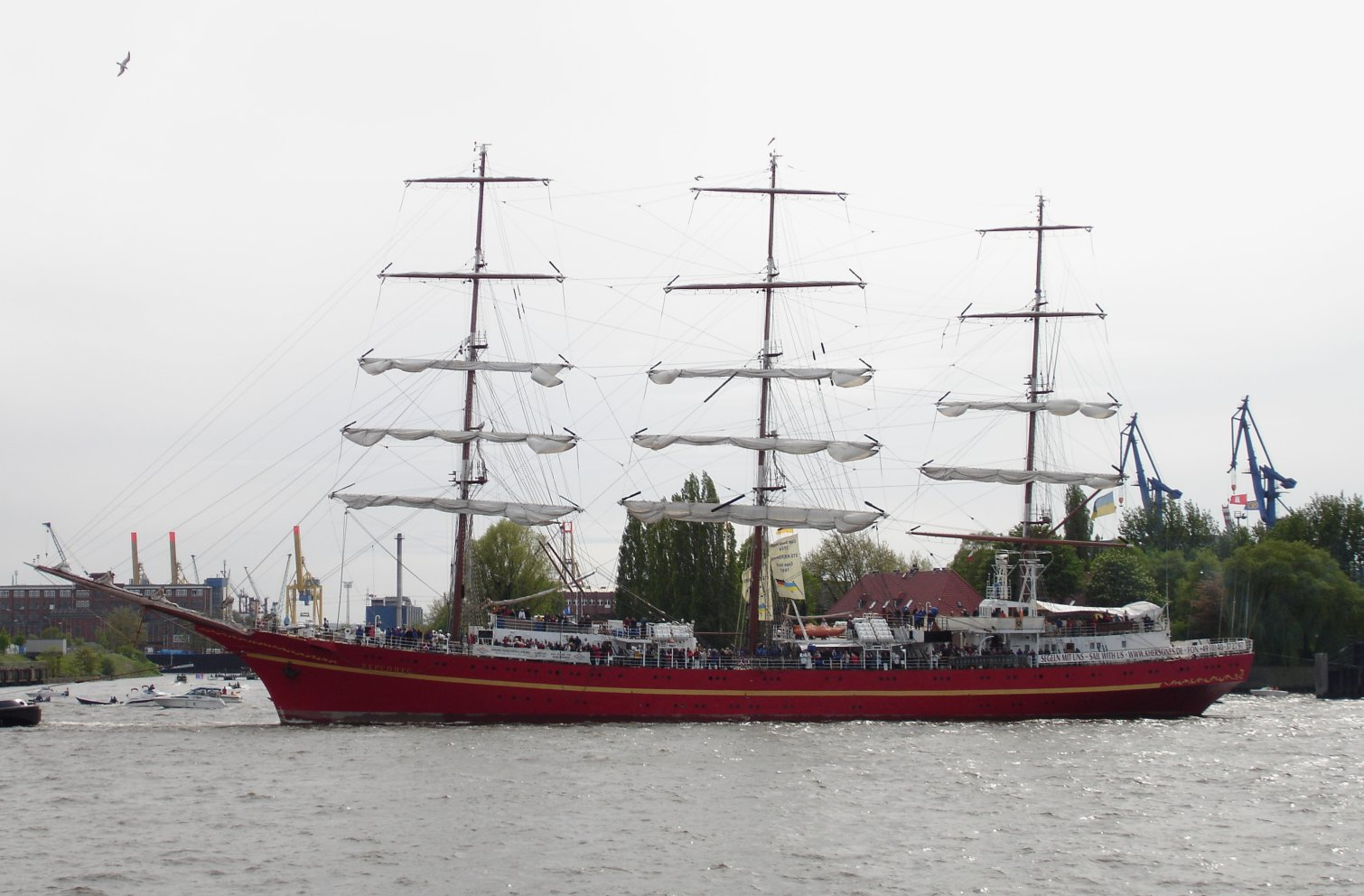 Die Khersones bei der Einlaufparade zum Hamburger Hafengeburtstag, 5.5.2005.